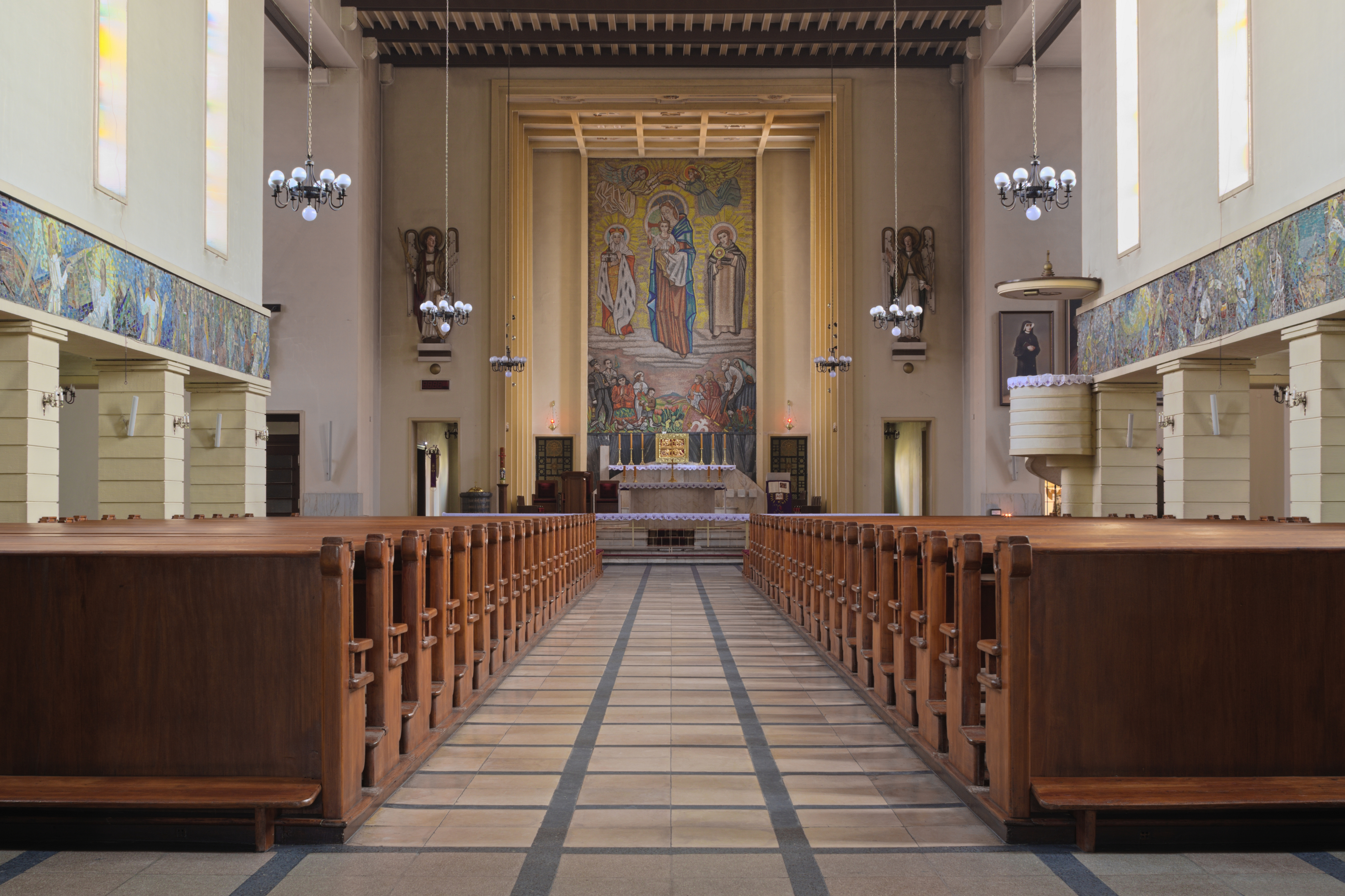 Kościół NMP Wspomożenia Wiernych w Gliwicach-Sośnicy, nawa główna; zdjęcie wykonane za zgodą proboszcza tejże parafii, ks. dra Piotra Grzegorzewicza